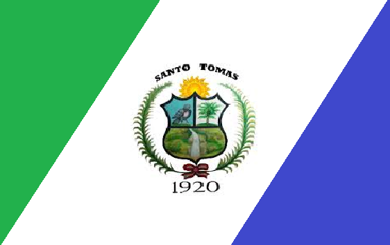 Bandera del distrito de Santo Tomás de Cutervo